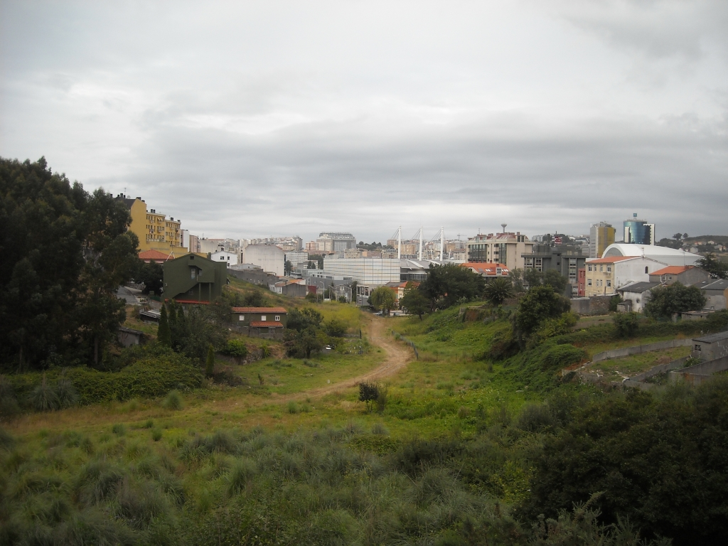 Curso que seguía o río Mesoiro antes da súa canalización.